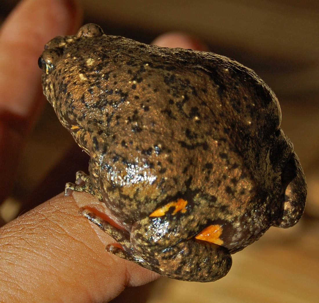 Kaloula baleata, brown bullfrog. From Gunung Betung, Lampung (south Sumatra), Indonesia